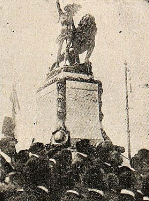 Inaguración de la Plaza Italia de Santiago de Chile en 1910. "El Monumento que representa a la Libertad"